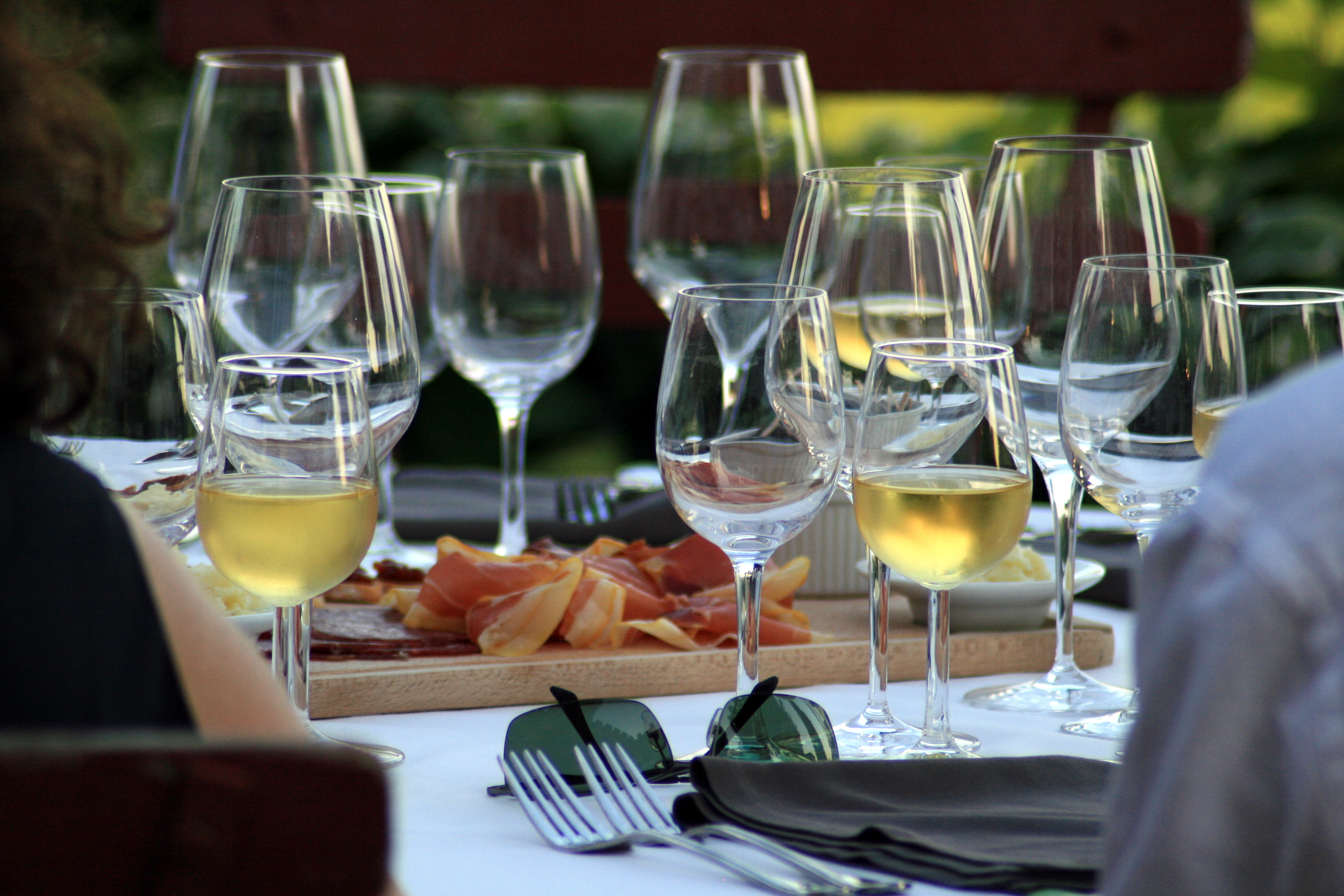 AOC châteauneuf-du-pape blanc